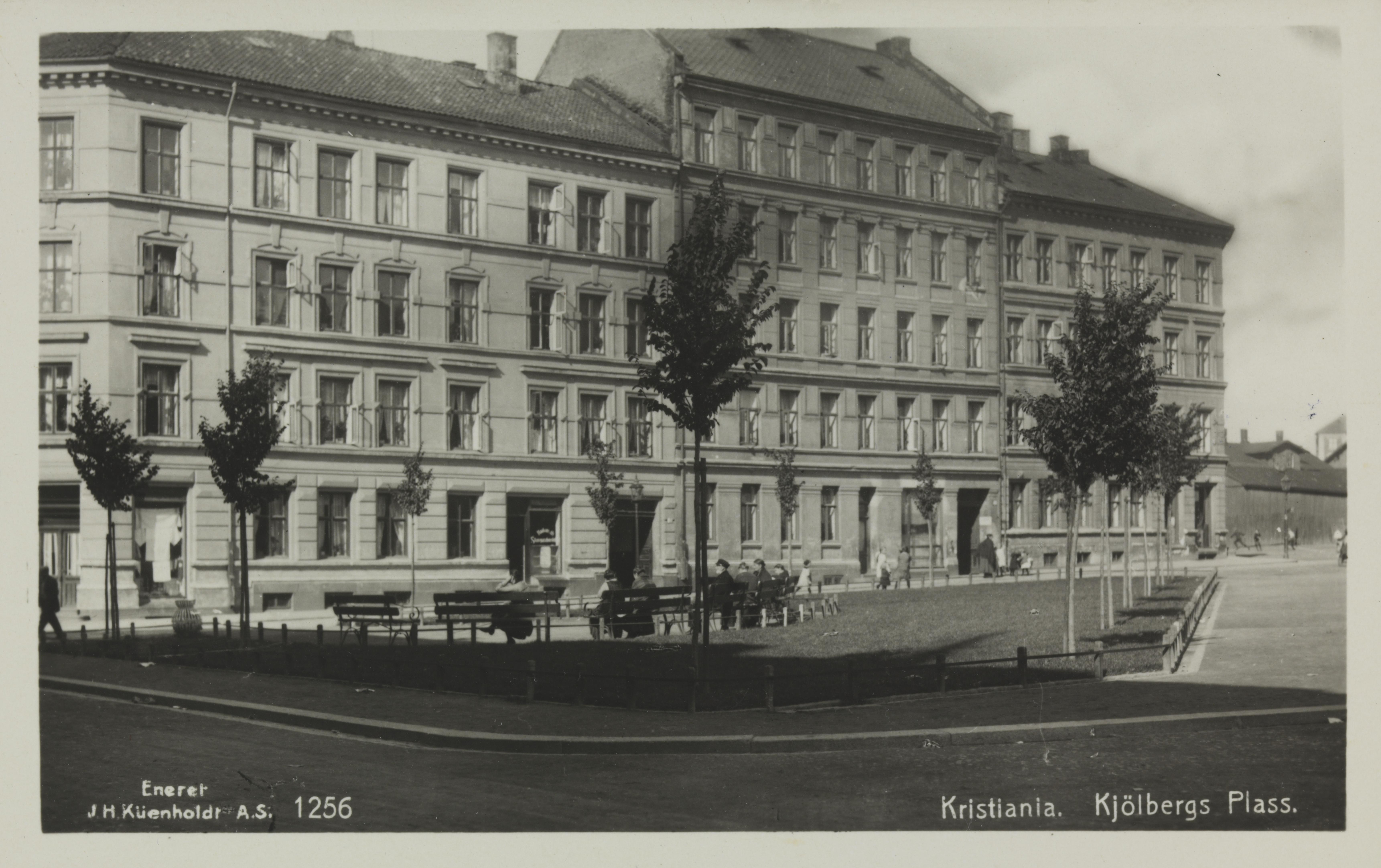 Bildet er hentet fra Nasjonalbibliotekets bildesamling Grønland,Kjølberggata, Oslo. Gårdene på bildet står fortsatt og har adresse (f.v.) Håkons gate 18, Håkons gate 22 og Jens Bjelkes gate 81.